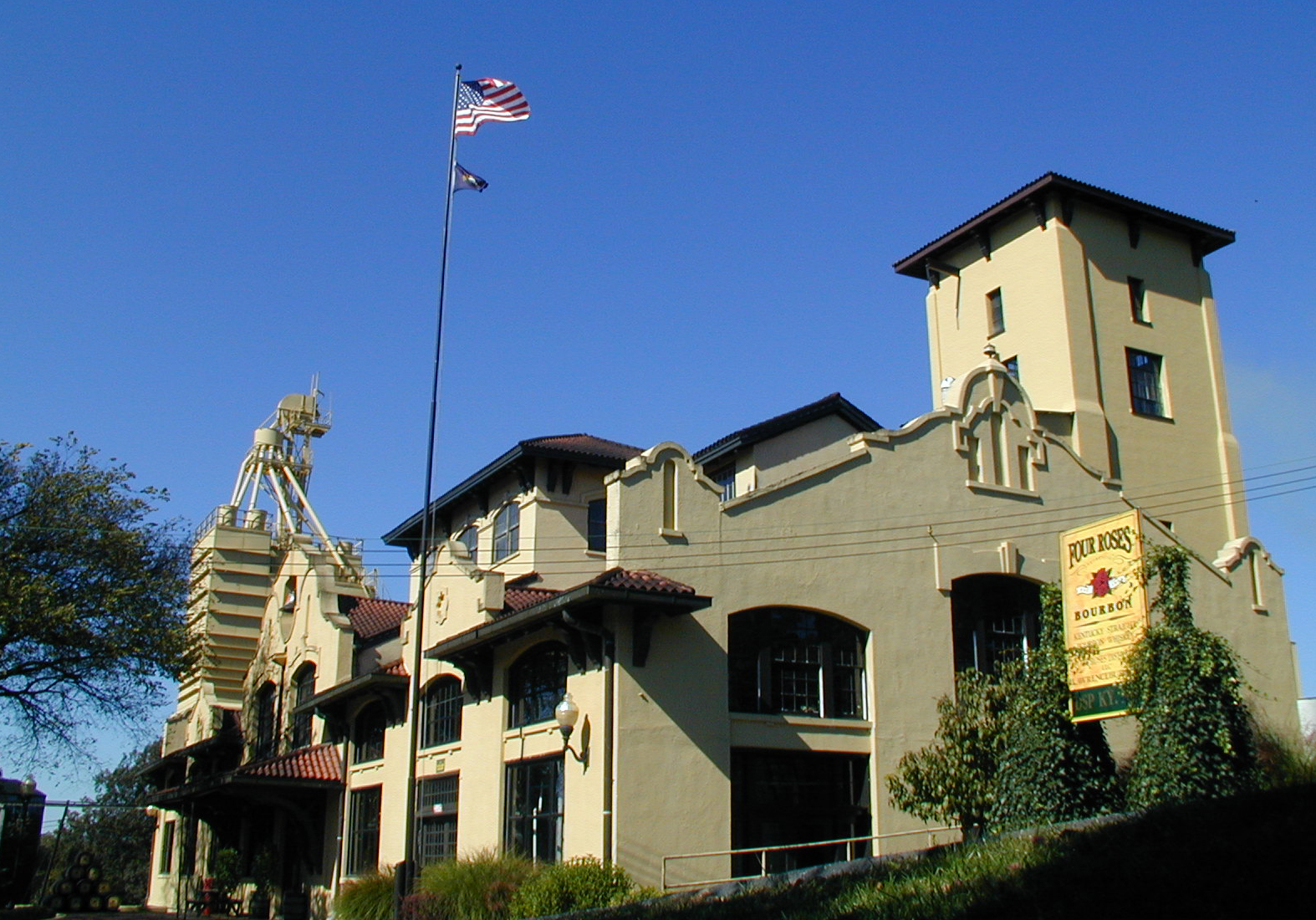 Fachada de la Destilería de Four Roses en Kentucky, EEUU